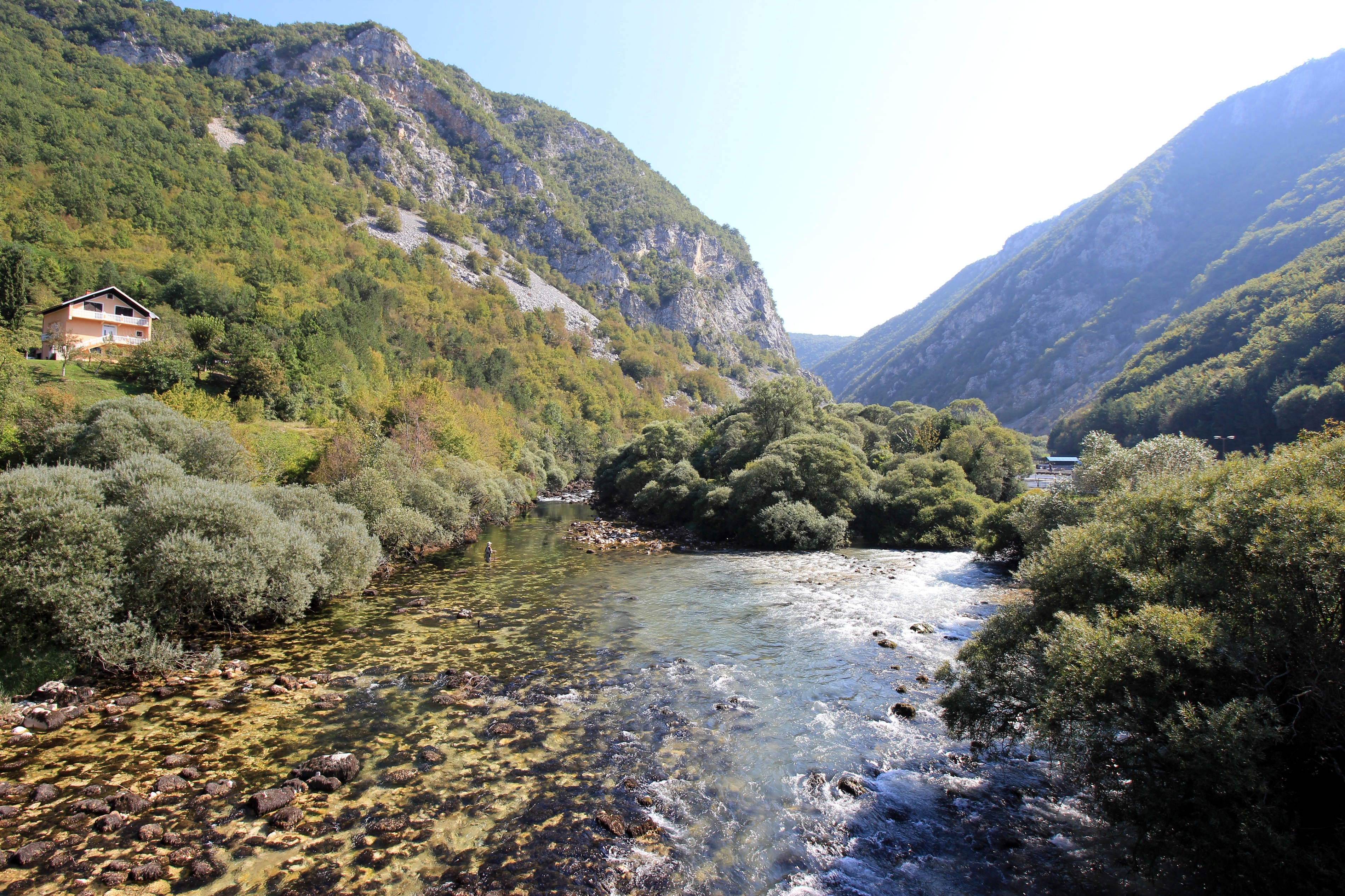 Beginn der Unac-Schlucht in Martin Brod, BiH.